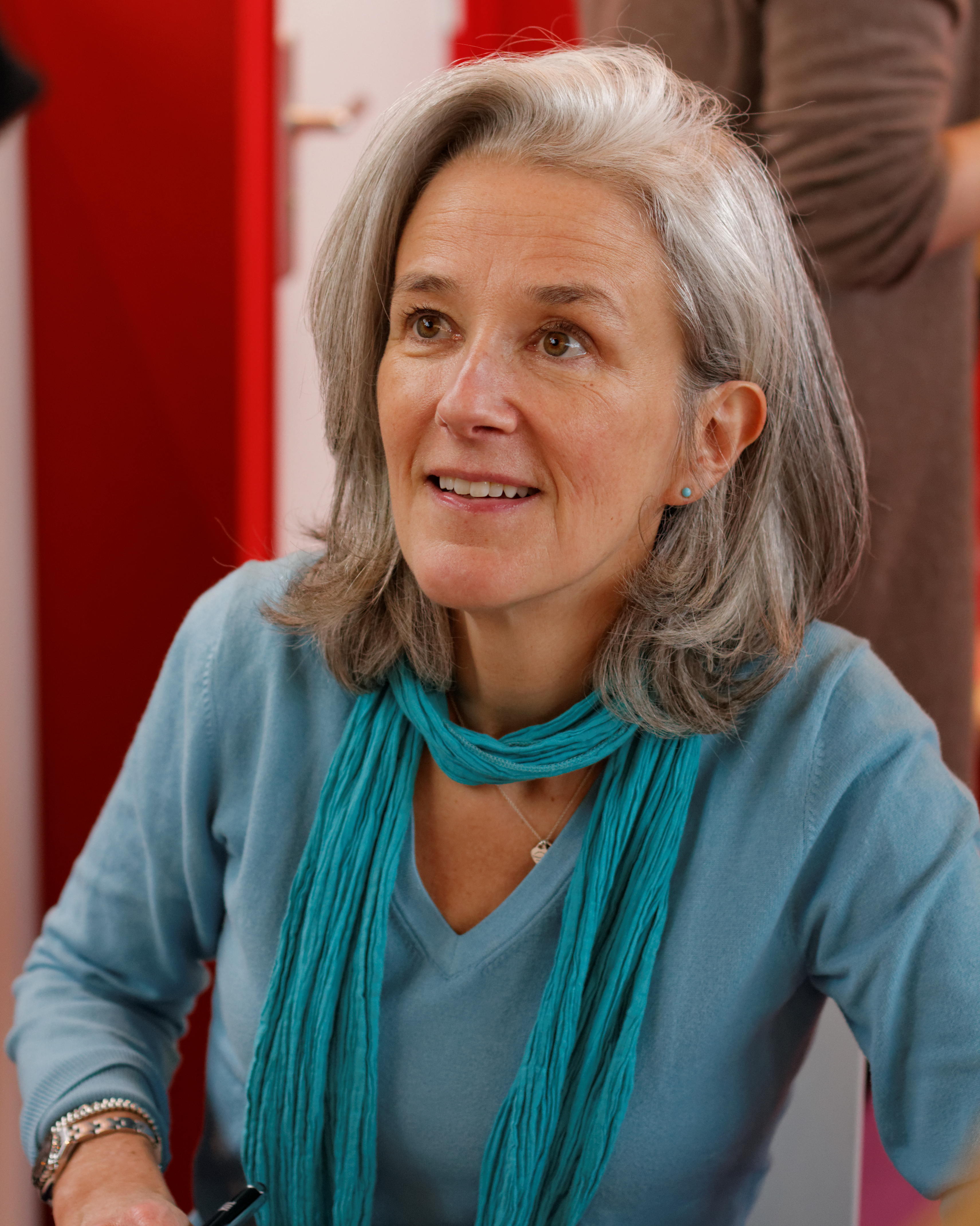 Tatiana de Rosnay, salon du livre de Paris, 2013